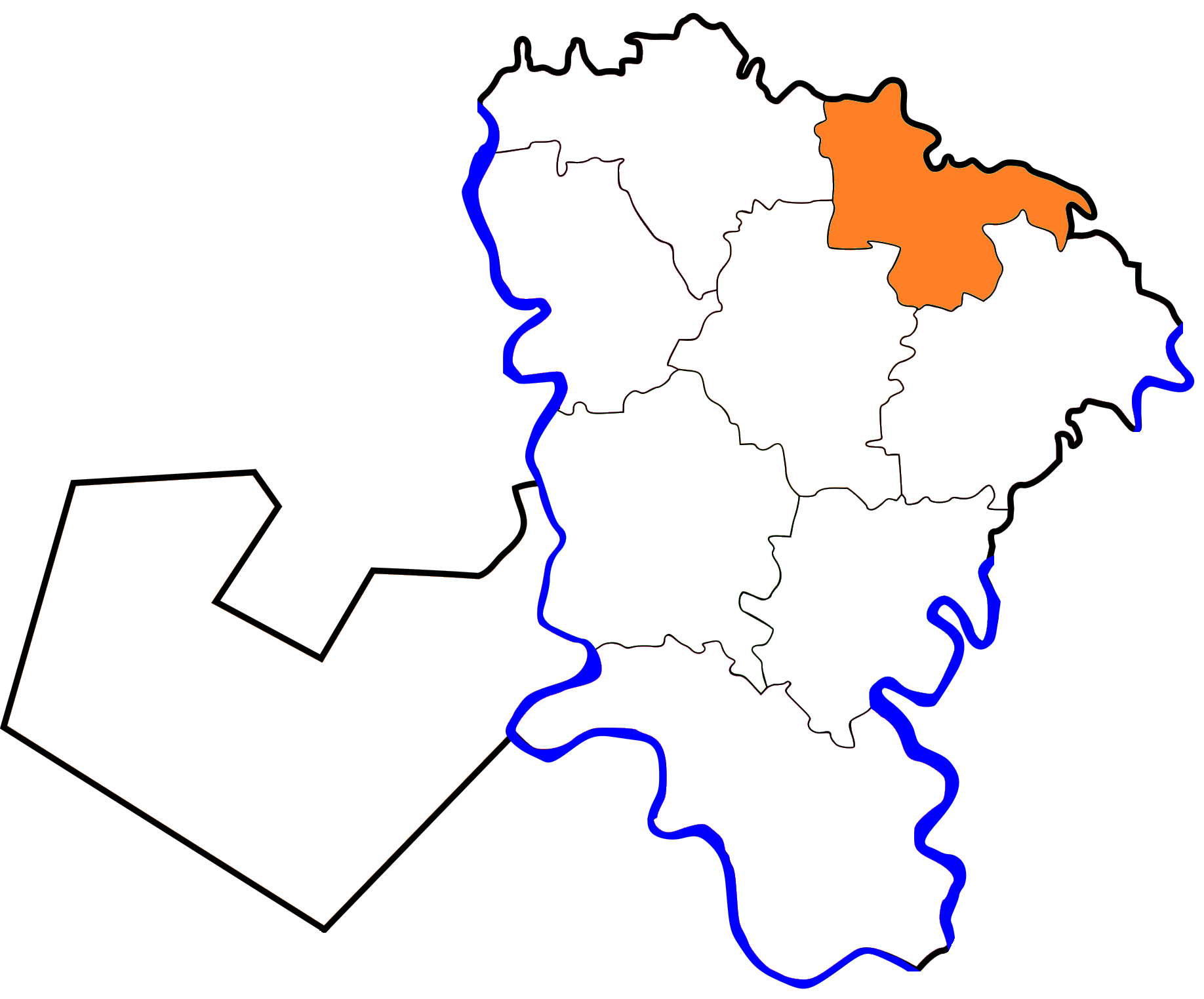 خريطة مركز بركة السبع بالنسبة لمحافظة المنوفية، مصر.